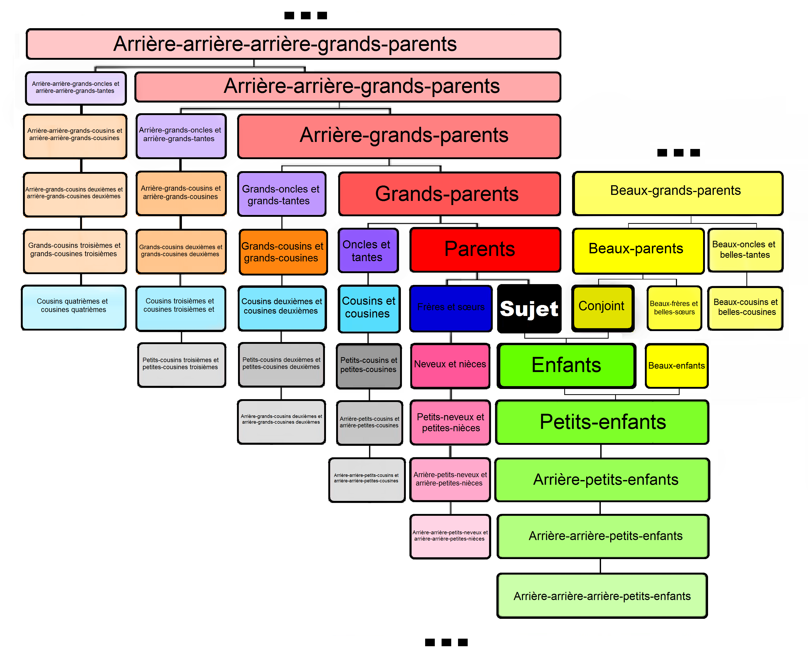 Parenté en français.